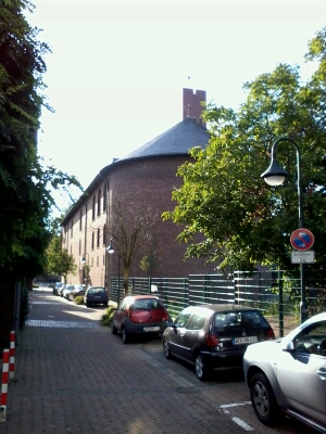 Wesel,St Maria Himmelfahrt Chorabsis